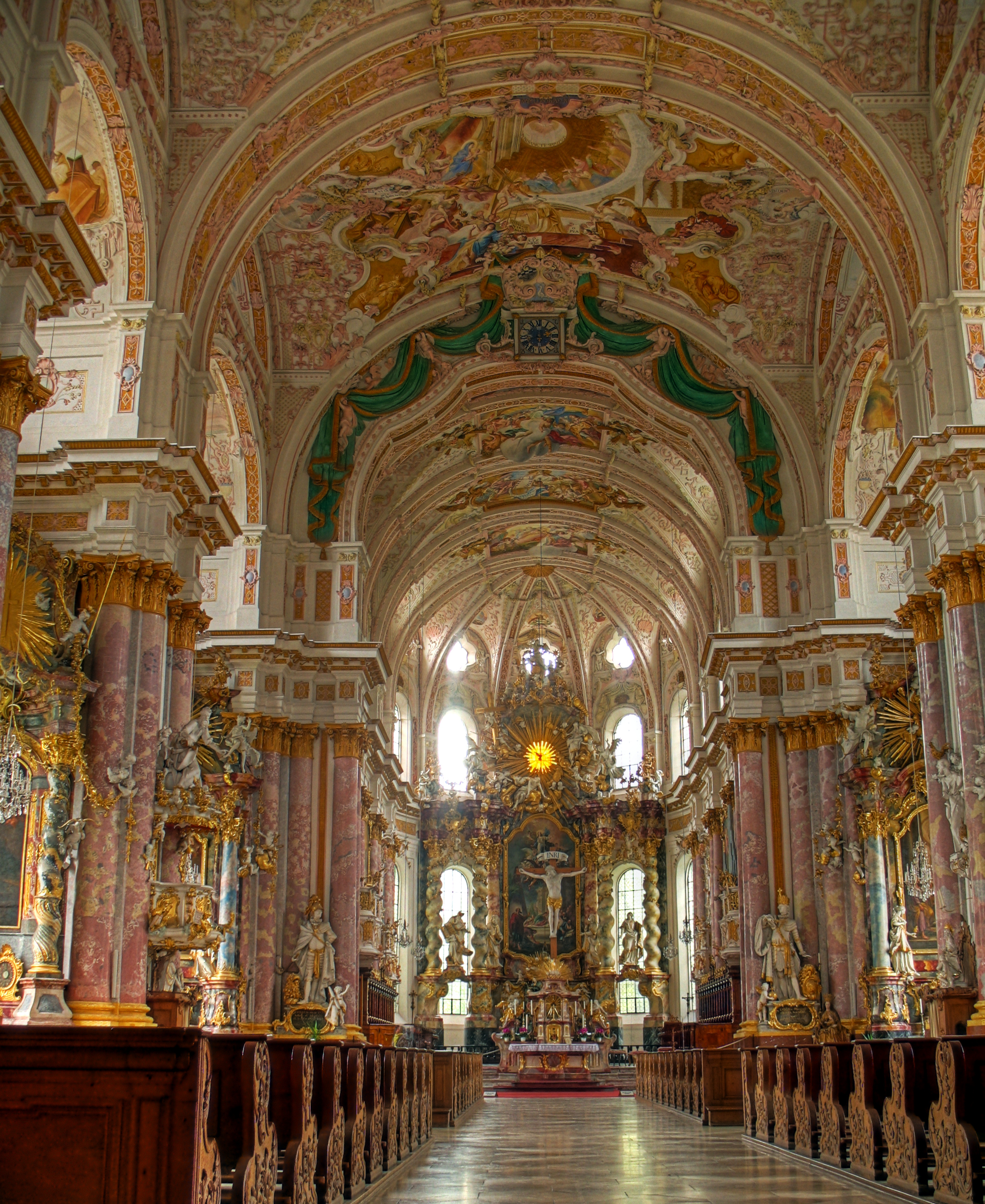 Deutschland, Bayern, Fürstenfeldbruck, Kloster Fürstenfeld, Hochaltar, Tone-mapped HDR-Aufnahme